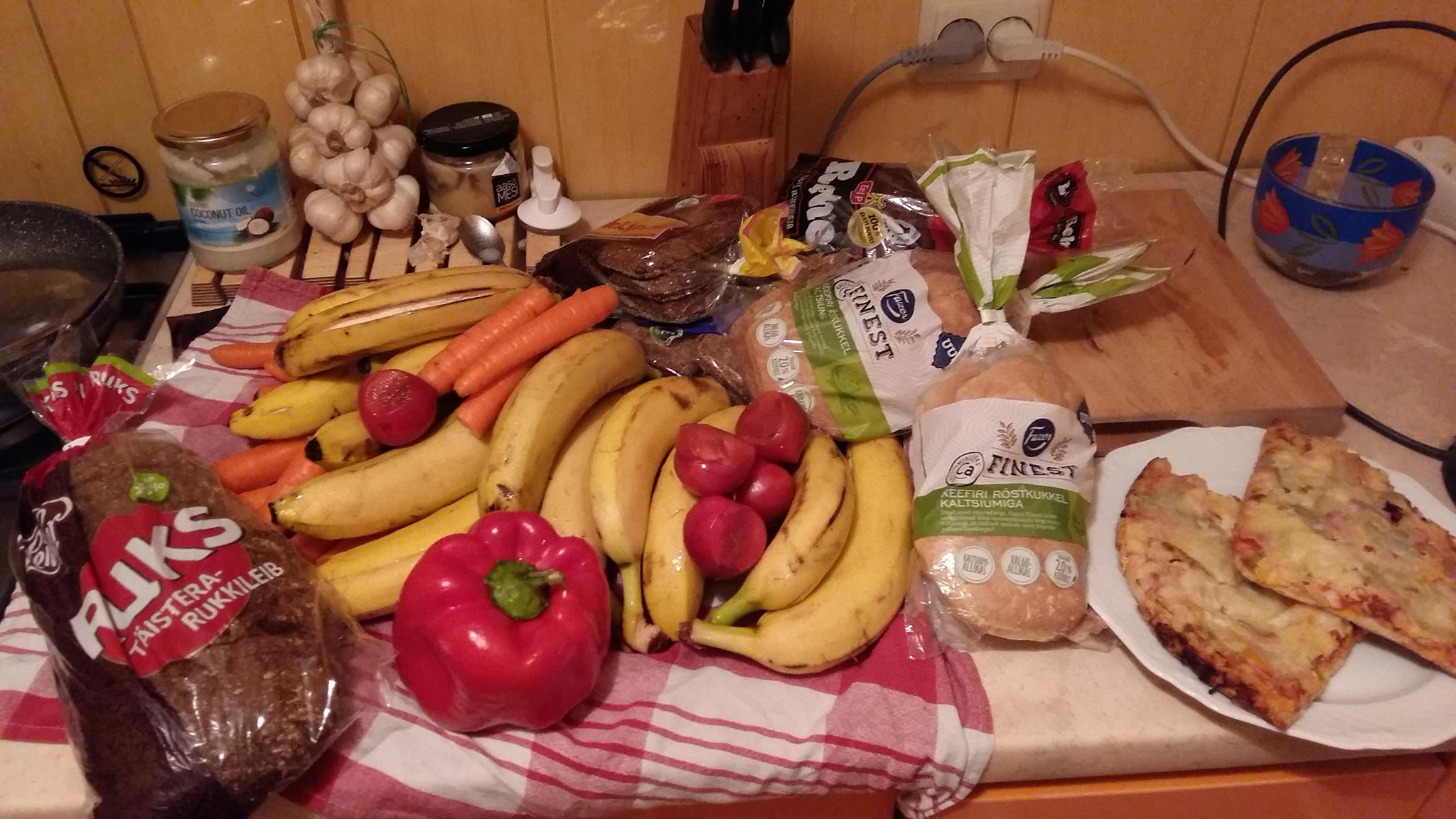 Prügisukeldumisel prügikastist leitud ära visatud söögiks kõlblik toit.